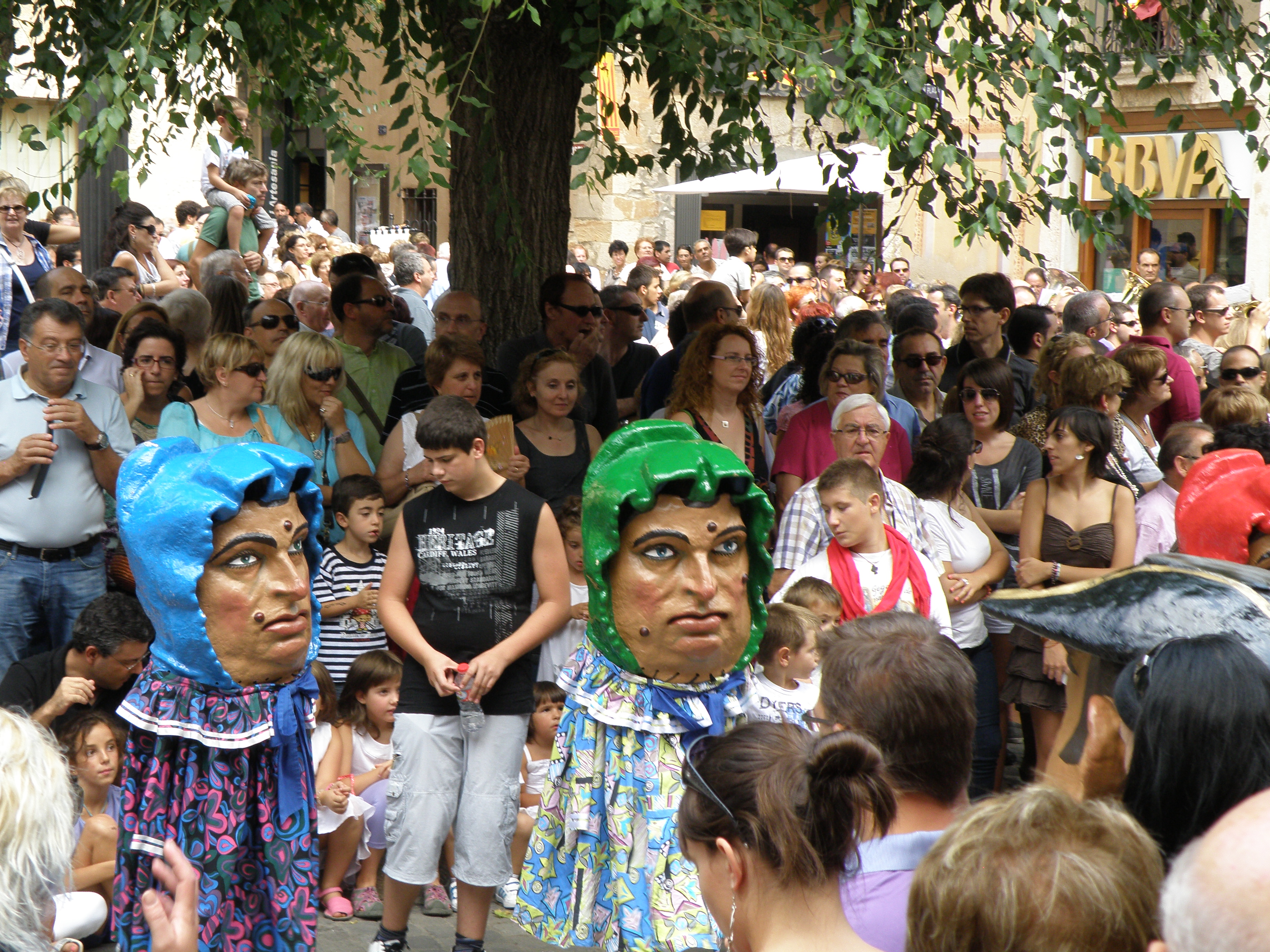 Dues nanes i un nan en la Festa Major del poble. Montblanc, Conca de Barberà.